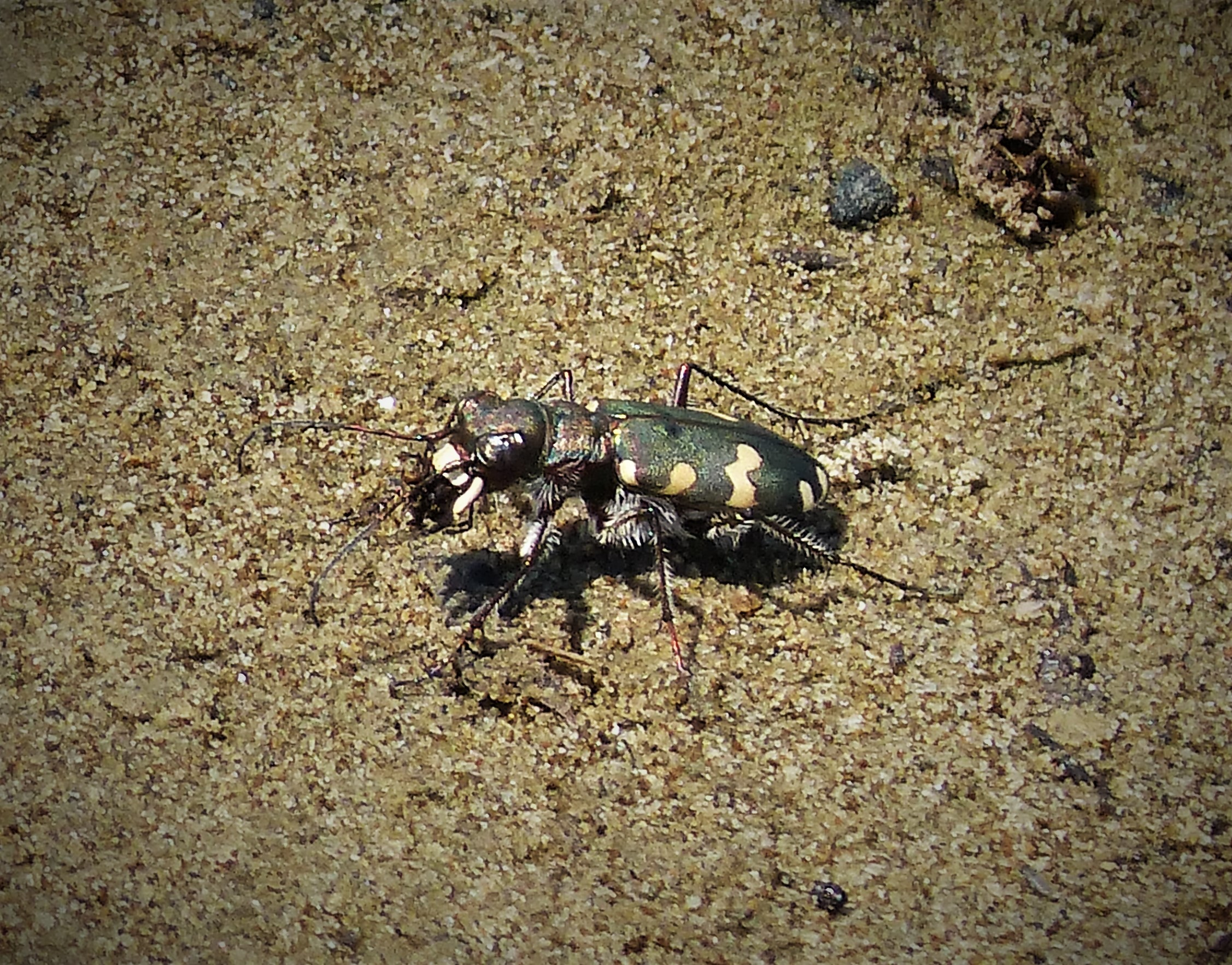 Karavasta National Park, Albania.